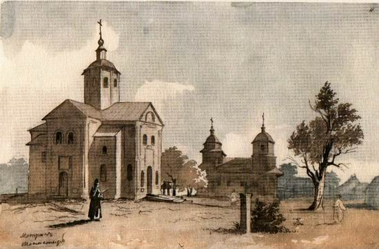 Shevchenko Taras. Motryn monastyr